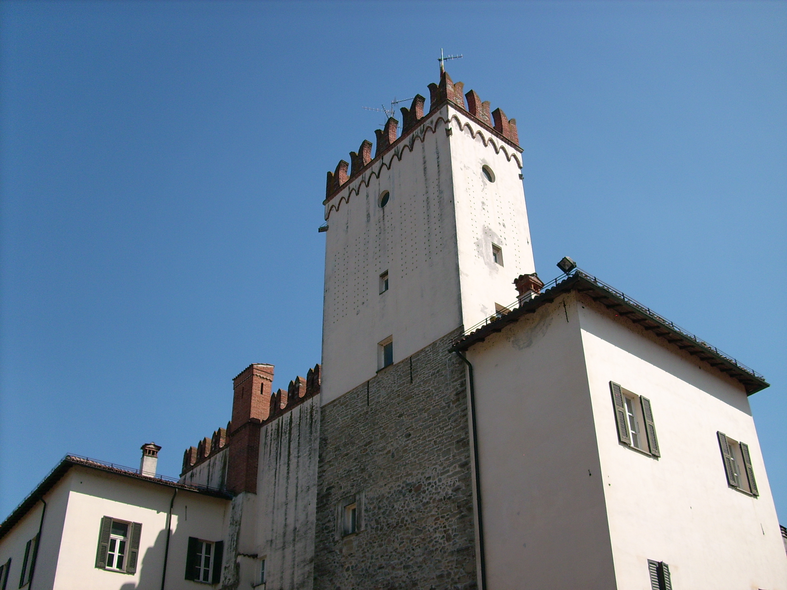 Torre medievale di Millesimo, Liguria, Italia